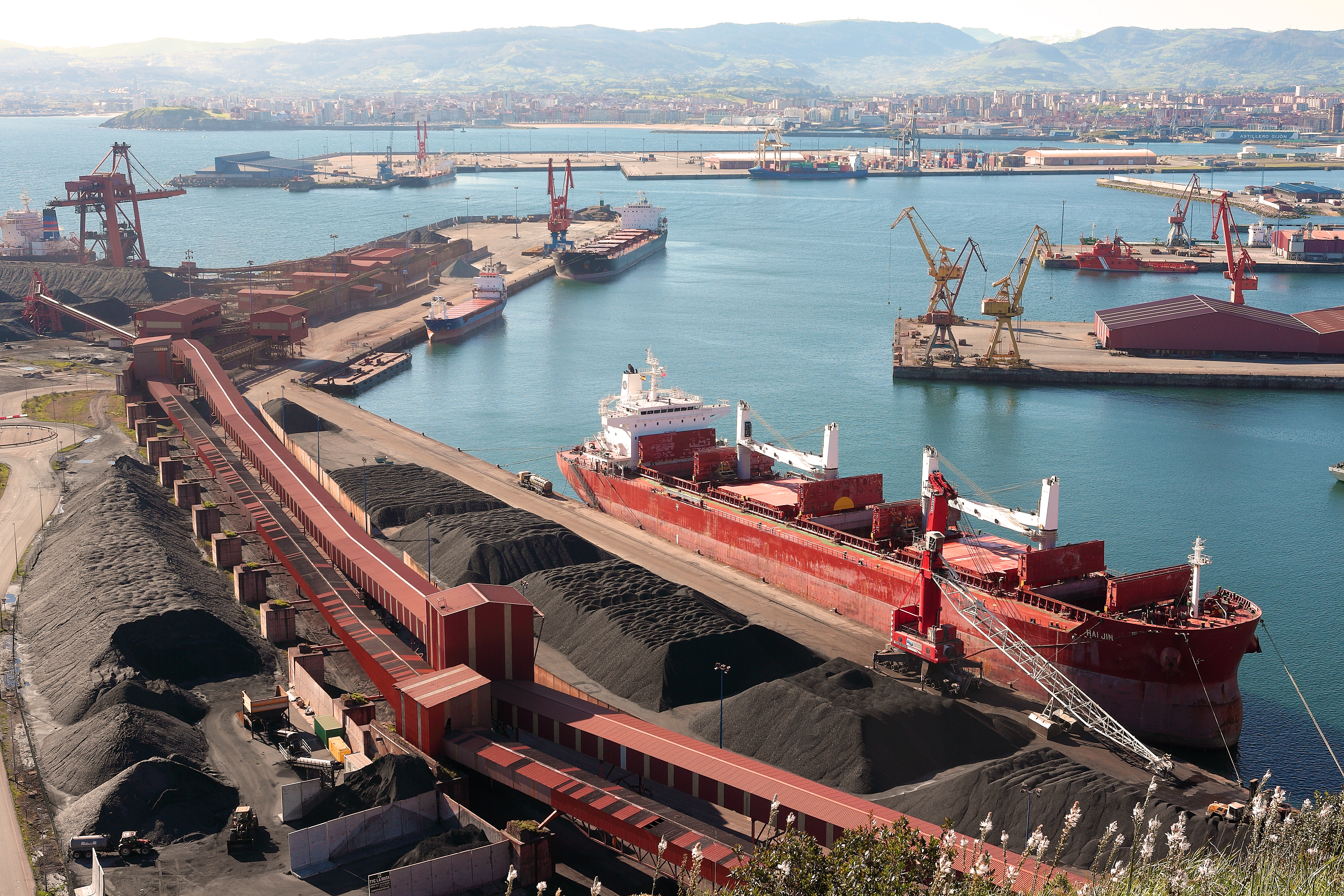 El Puerto de Gijón visto desde el alto de la Campa Torres.